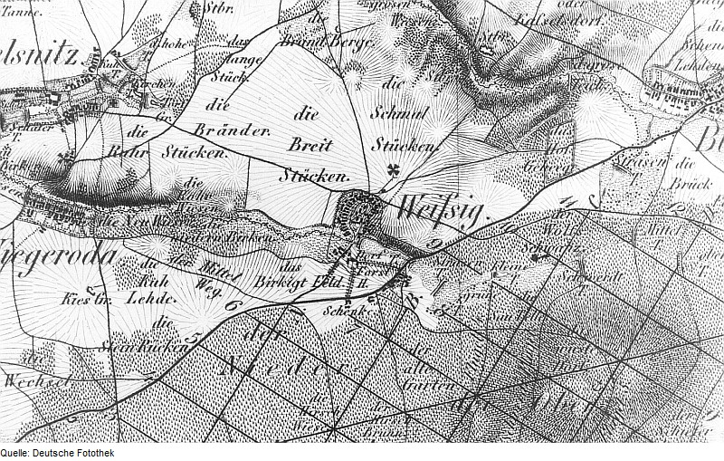 Original image description from the Deutsche Fotothek Weißig a. Raschütz. Oberreit, Sect. Großenhain, 1841/43